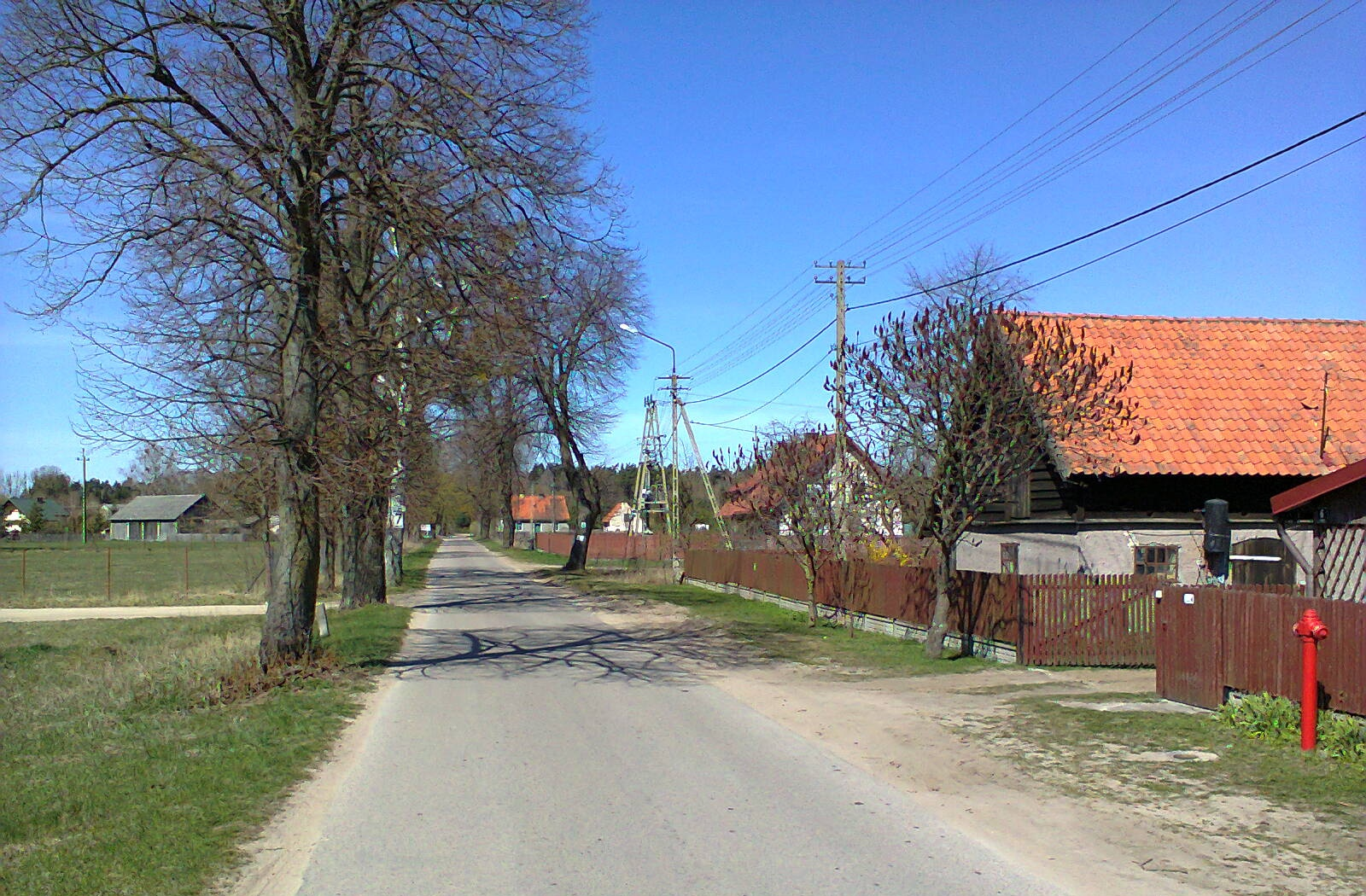 Karwik